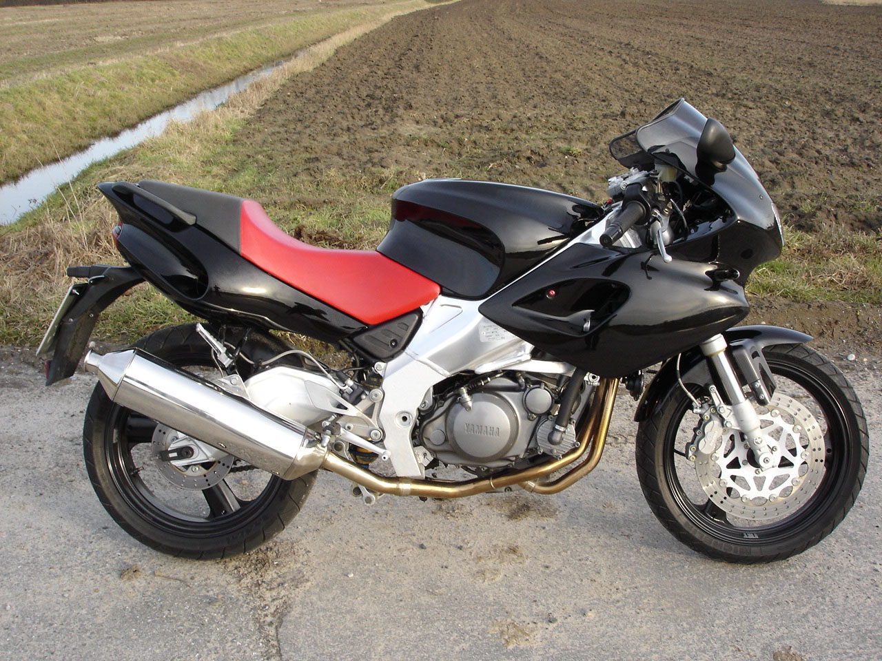 Yamaha SZR 660